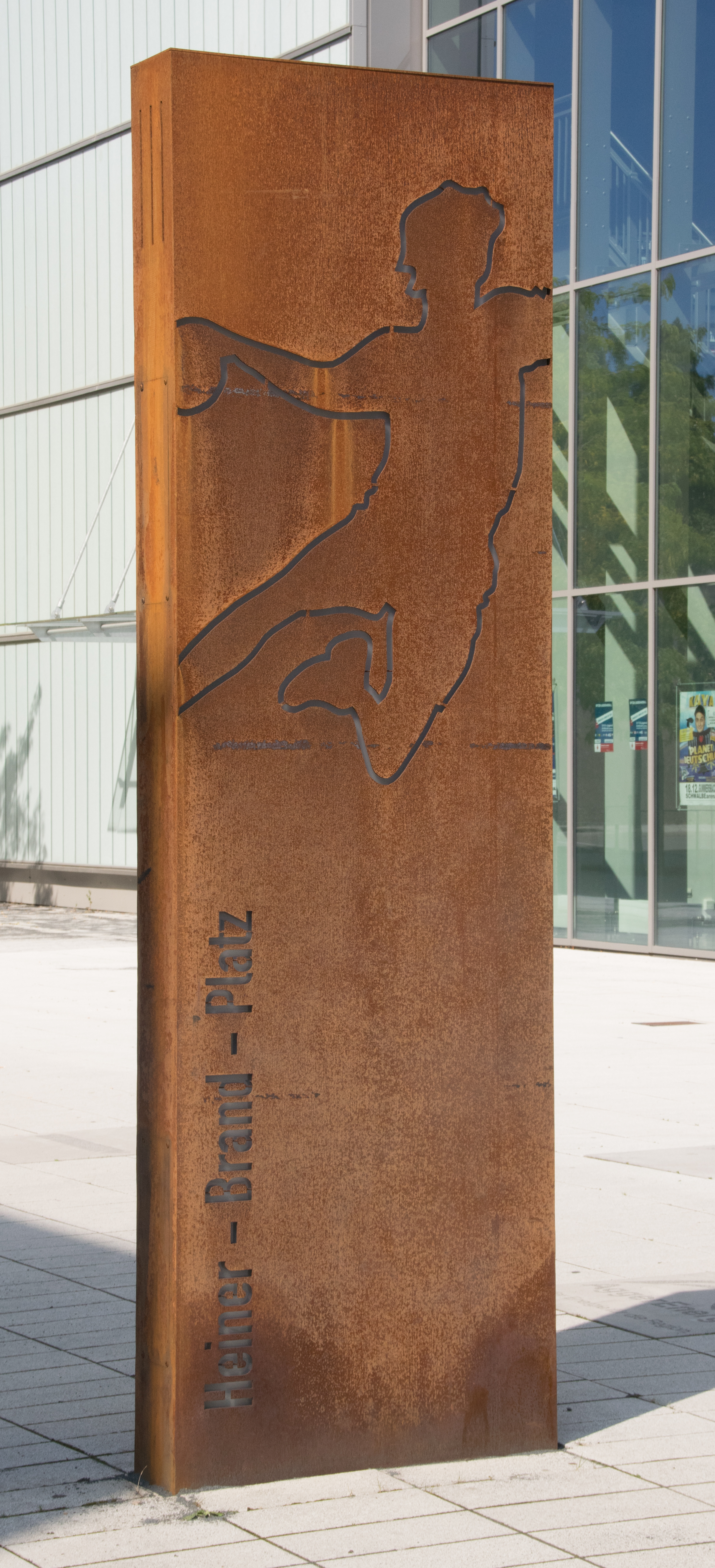 Heiner-Brandt-PLatz in Gummersbach